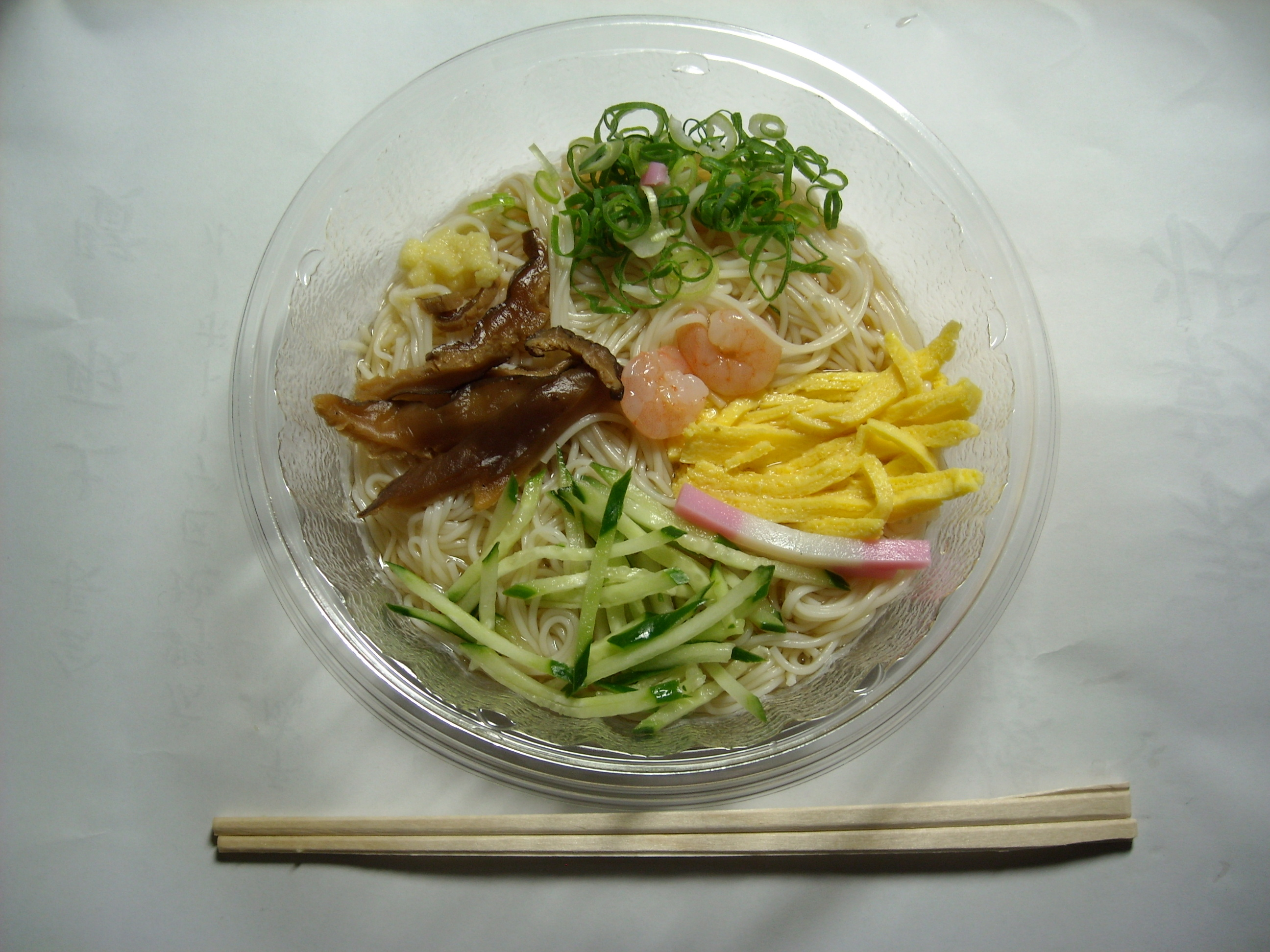 関西で販売されている「ぶっかけ素麺」の例